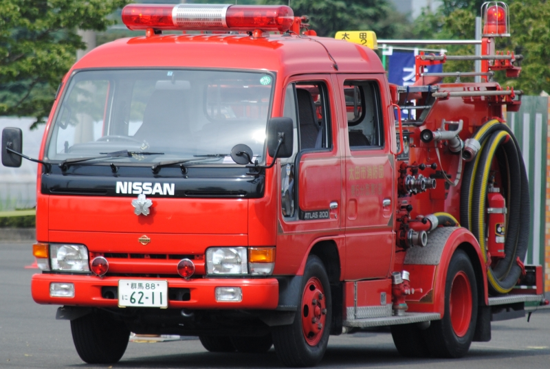 太田市消防団のポンプ車。太田市防災訓練にて撮影。